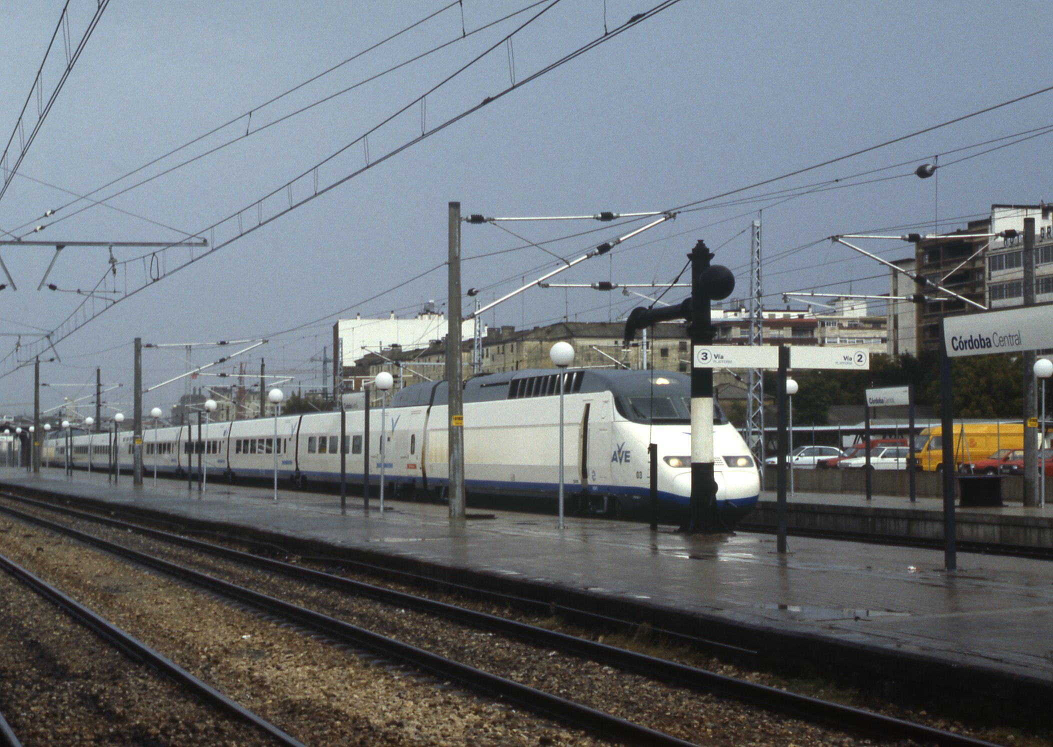 Het oude Córdoba station in 1992 voor de verbouwing maar al bediend door de AVE. Er is nog een waterkraan voor stoomlocomotieven.